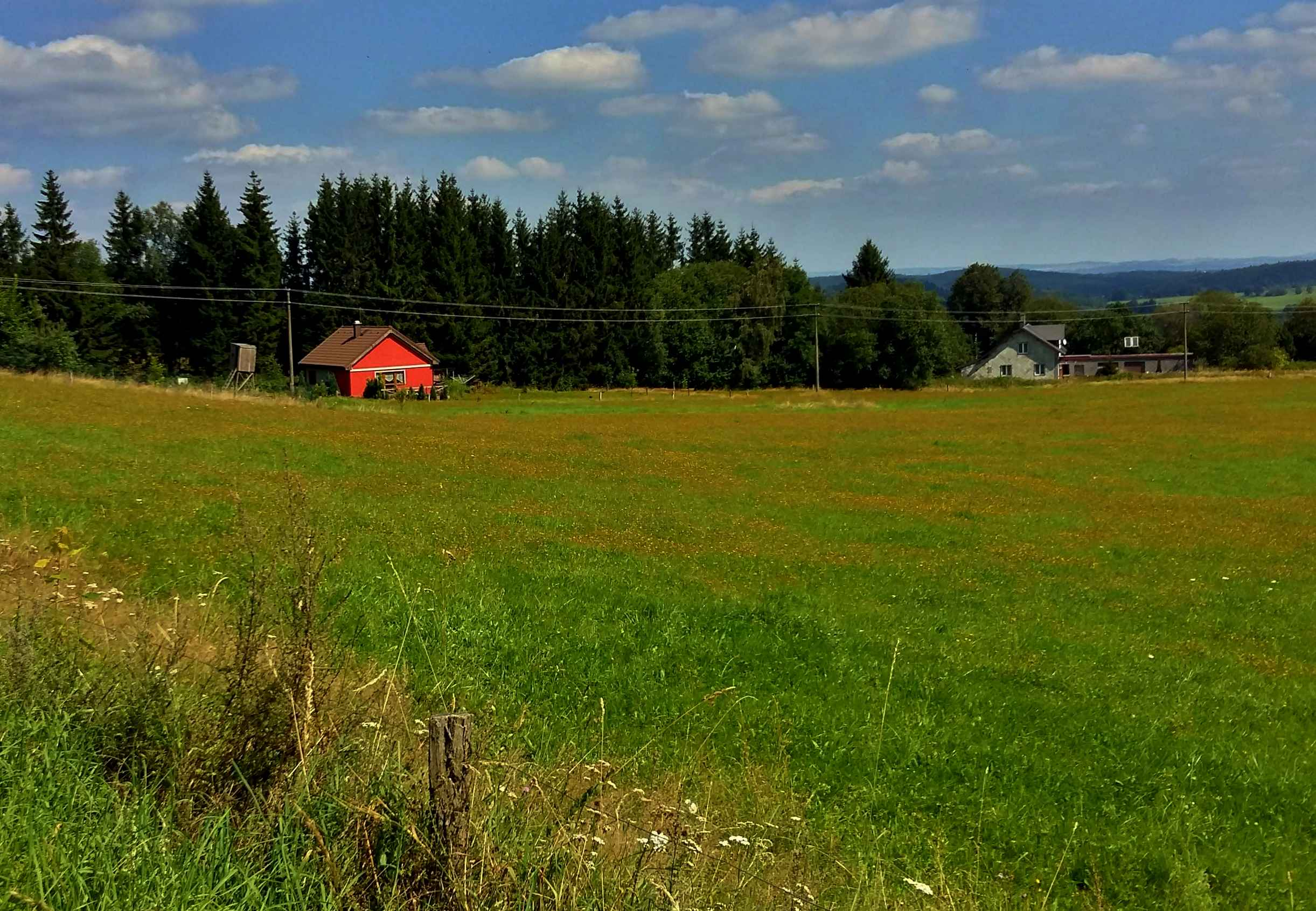 Zadní Milíře - chalupy